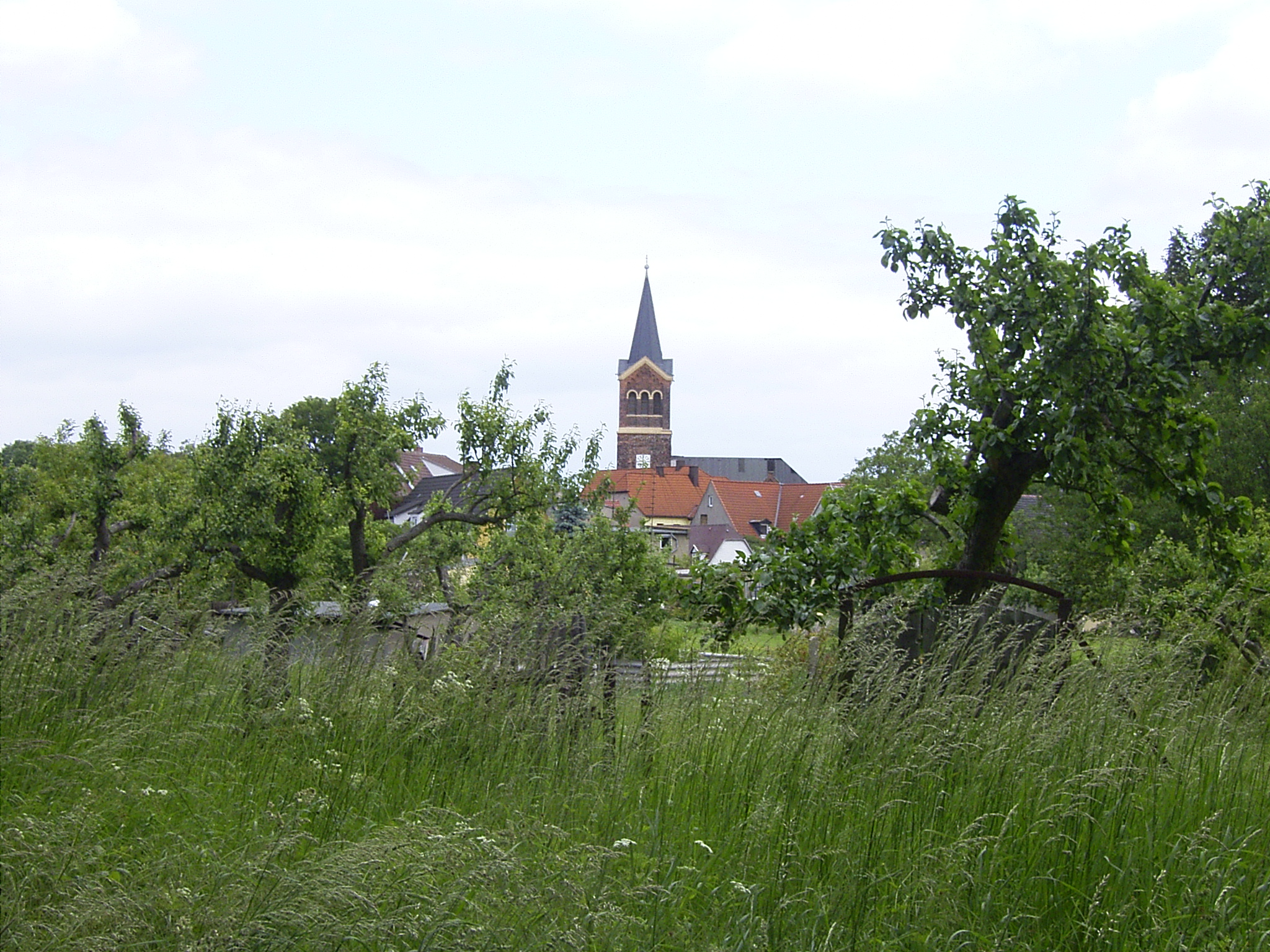 Kirche Radegast Anhalt